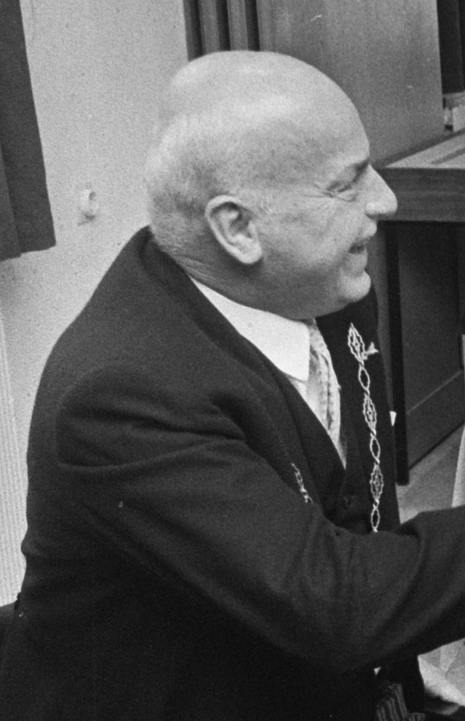 Prinses Beatrix en Prins Claus brengen werkbezoek aan Zuid Holland , burgemeester P. W. Hordijk begroet in rolstoel Prinses Beatrix en Prins Claus /